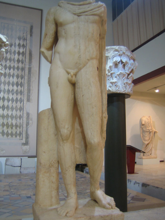 Estatua de finales del siglo I a. C. representando a un joven desnudo, ataviado con una clámide. Encontrada en 1945. En principio atribuida a Hermes, sin embargo los paralelos más próximos la sitúan a un modelo relacionado con obras que narran las aventuras de Paris, acompañado de Eros. Museo arqueológico de Cartagena